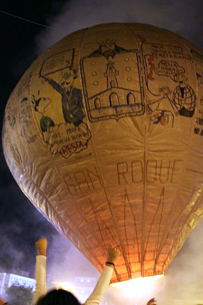 Aeróstato de Betanzos, Galicia (Spain).jpg Tras el susto, el globo de Betanzos voló Eran las 12 de la noche y el centro de Betanzos aguantaba la respiración. Tal y como se ha ido realizando desde el año 1875, el aerostato que colgaba de la iglesia de Santo Domingo comenzaba a coger la fuerza suficiente para elevarse. La plaza, repleta a rebosar por unas 70.000 personas, esperaba el vuelo del globo número 130. A tan solo unos metros del suelo, la lancha que colgaba del aerostato se prendió, lo que asustó a los espectadores, que vieron una gran columna de humo. Como se aprecia en la grabación, muchos pensaban que todo el artefacto se había incendiado. No obstante, solo la parte inferior lo hizo y, pese al susto de los que se encontraban en la zona, no hubo heridos. Después del incidente, el globo hizo lo mismo que todos los años: subir al cielo. Debido a lo débil que soplaba el viento, su ascenso, como se aprecia en las imágenes, fue bastante vertical.